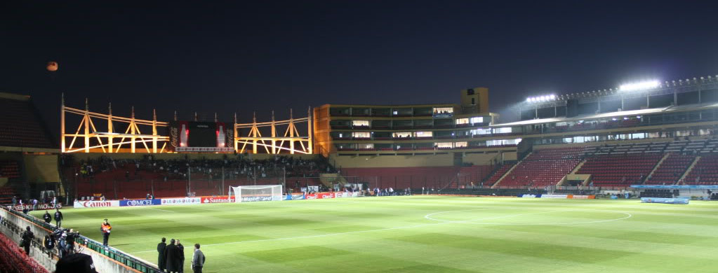 Foto tomada durante la Copa América 2011.